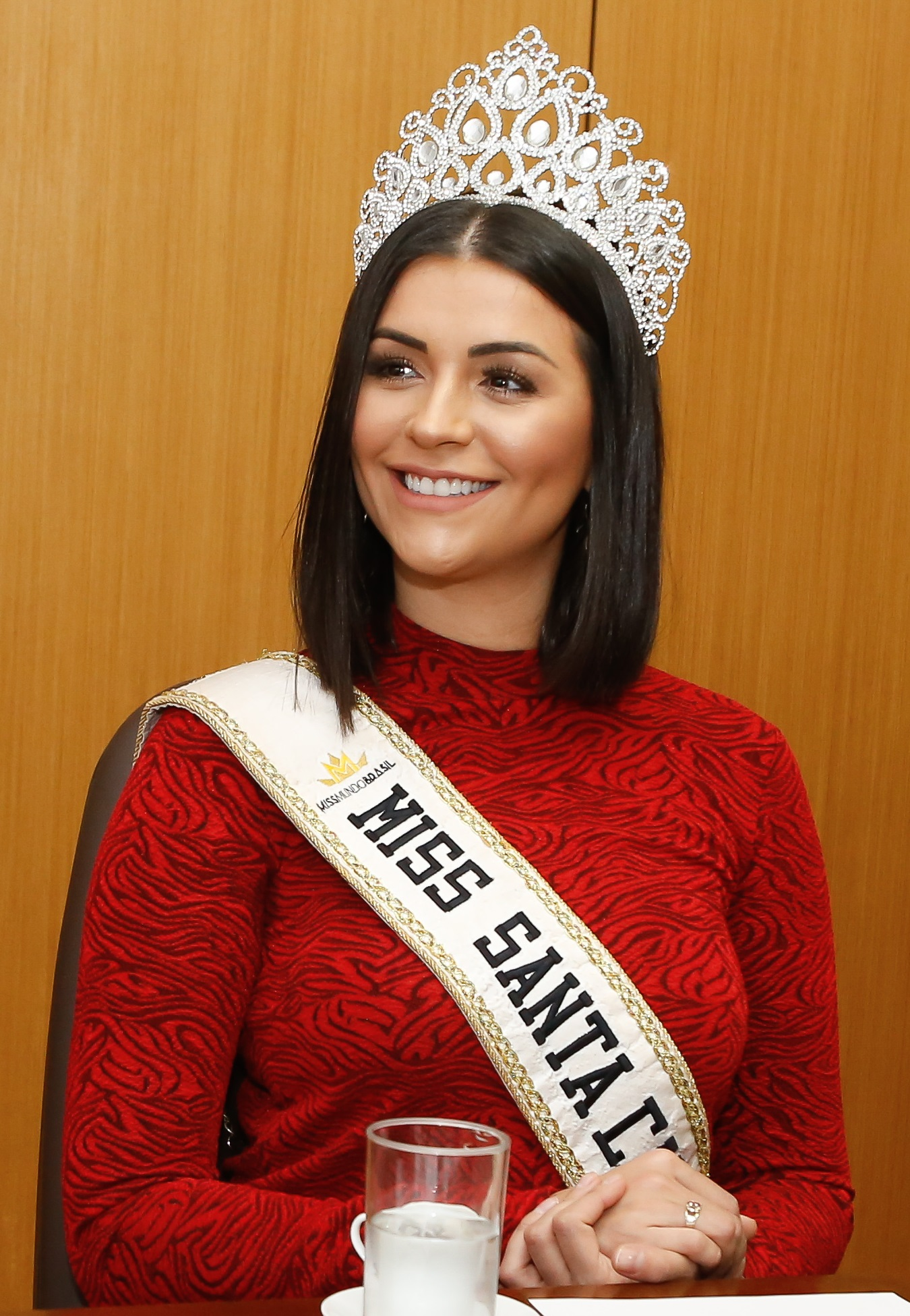 Evento celebra cultura catarinense, no Pavilhão de Eventos do Parque da Cidade, em Brasília, com atrações culturais típicas, Oktoberfest, pista de patinação no gelo, culinária e moda.